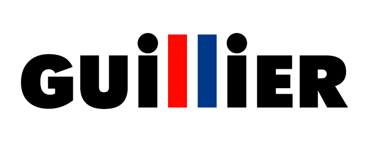 Logo utilizado por la campaña presidencial de Alejandro Guillier en 2017.